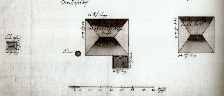 Grundriss des Gutes Haselhof von 1783 mit abgebrannten Wohnhaus (Mitte).